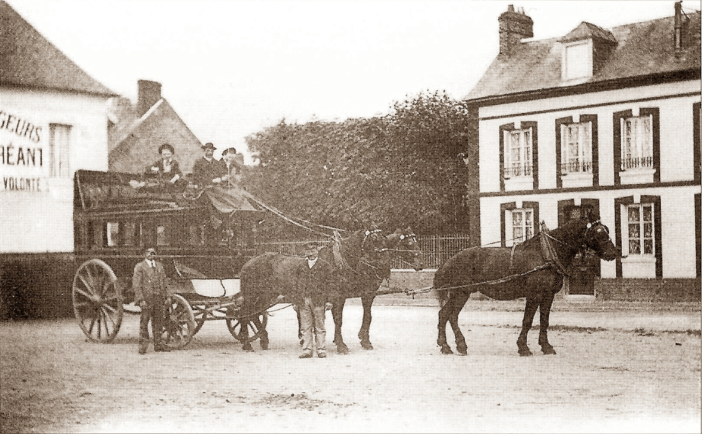 Diligence à Yerville (76)